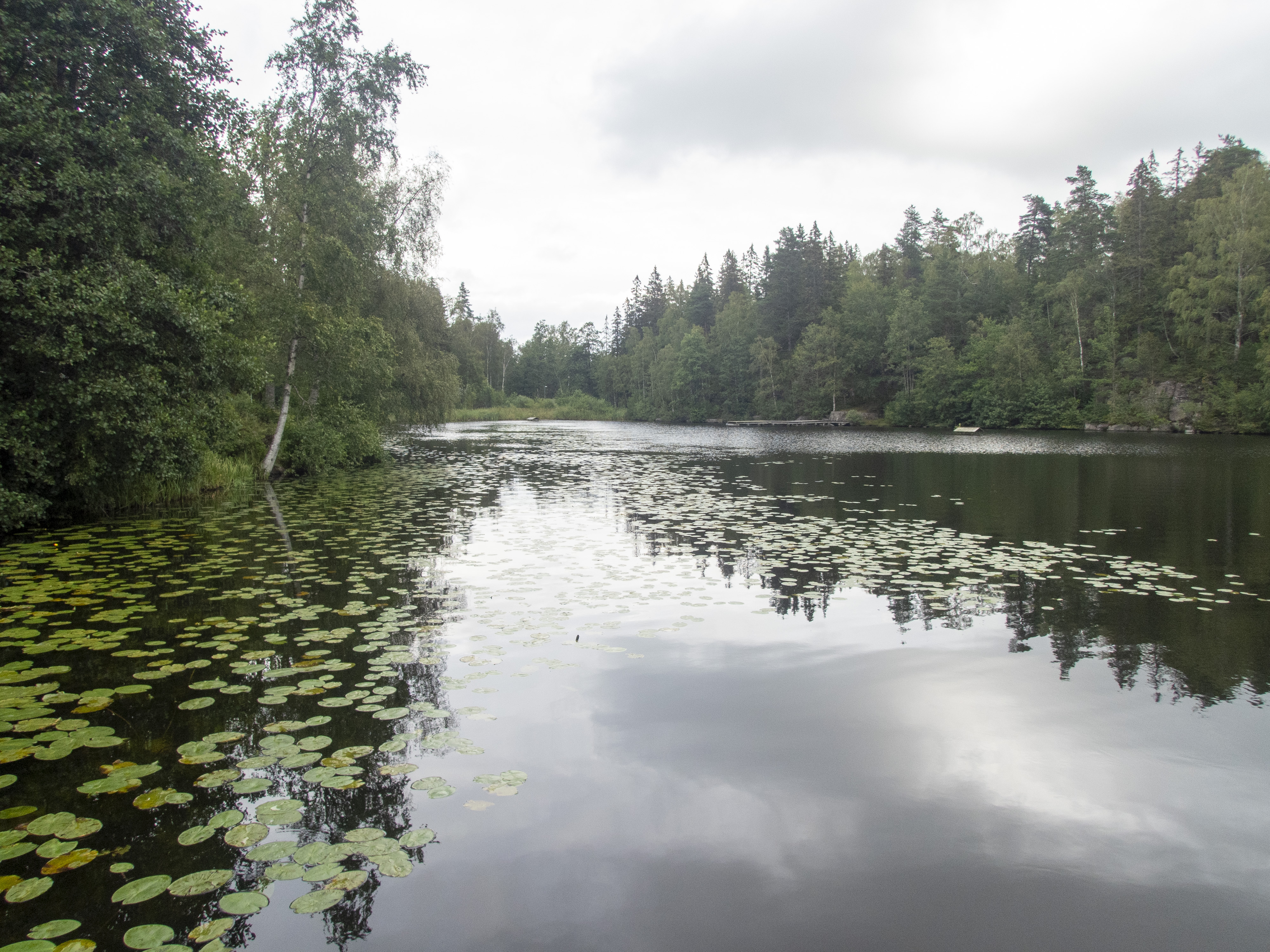 Hållsdammen på Billingen